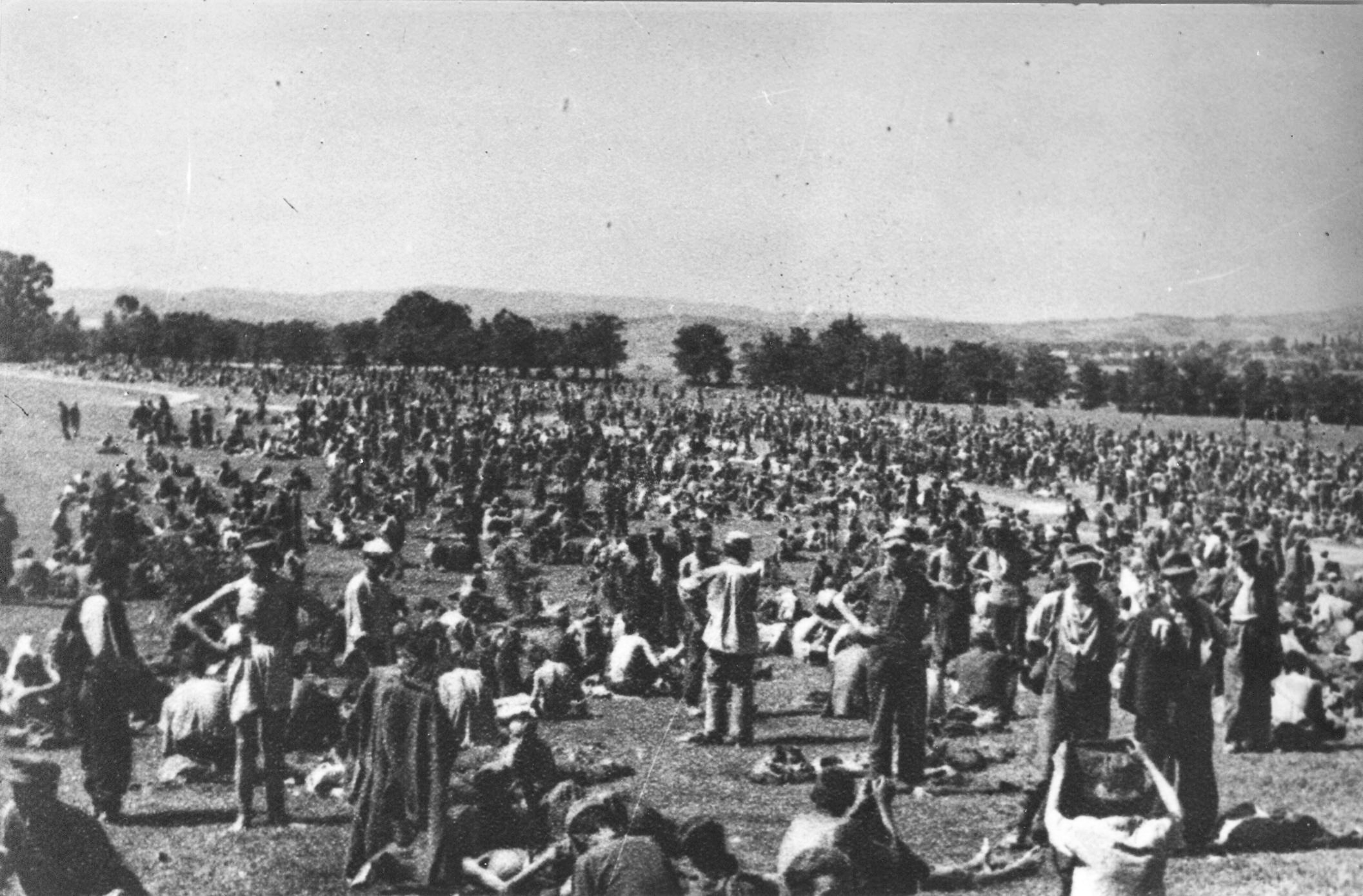 Zajeti Nemci, Ustaši, Četniki v Mariboru.